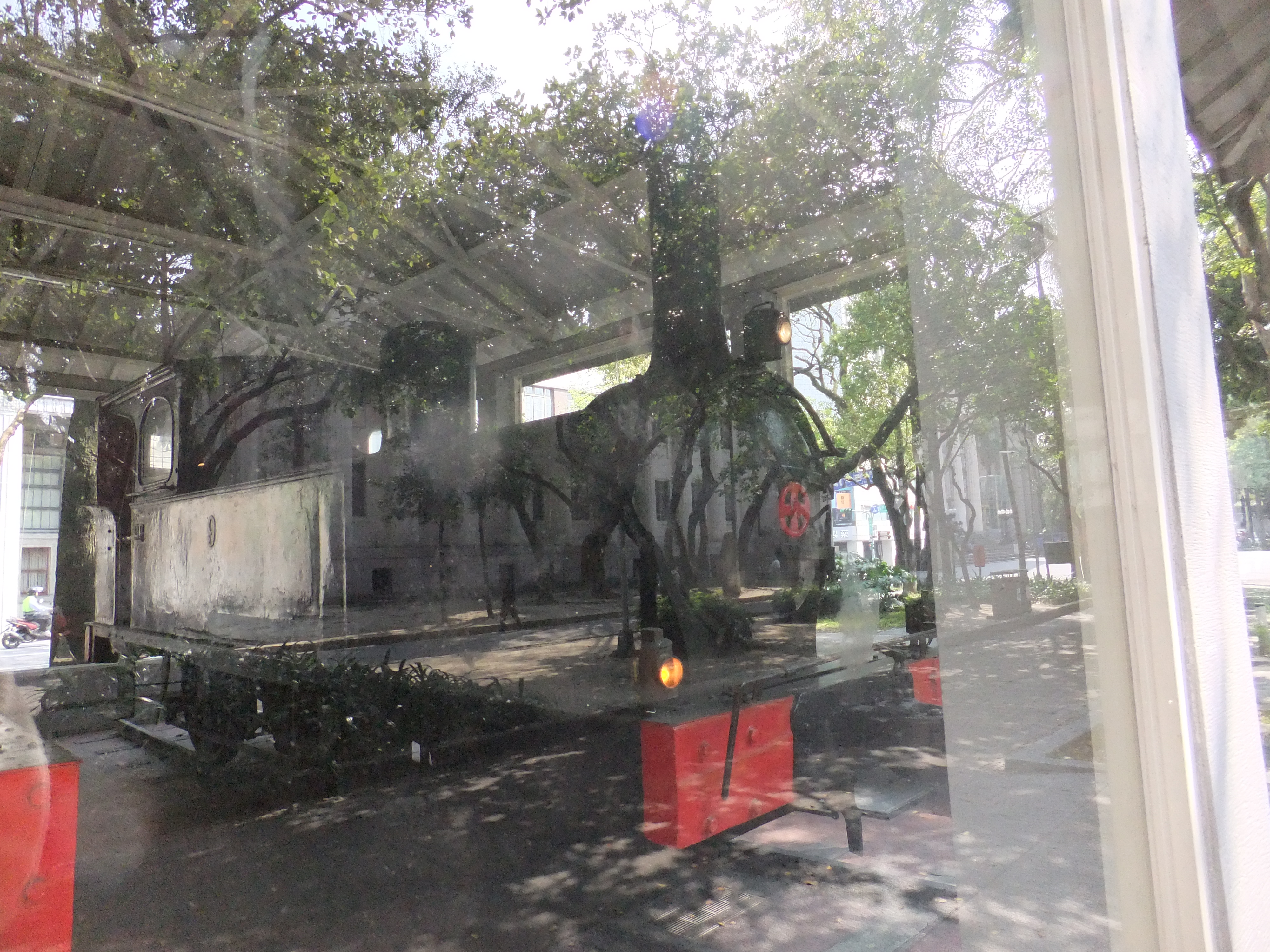 台湾で保存されている日本国鉄蒸気機関車。